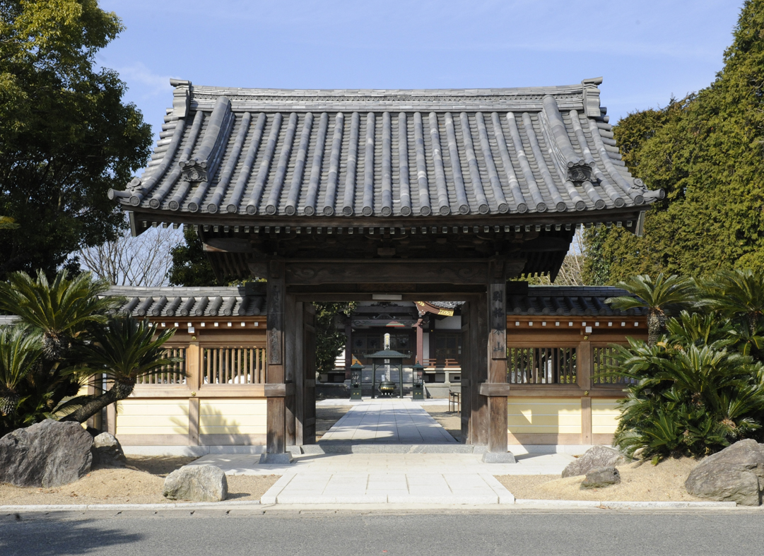 中門（延命門）